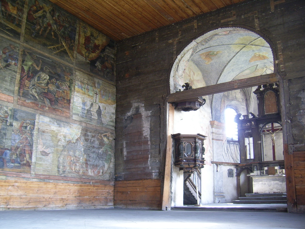 Wnętrze kościoła św. Jerzego, Gliwice-Ostropa